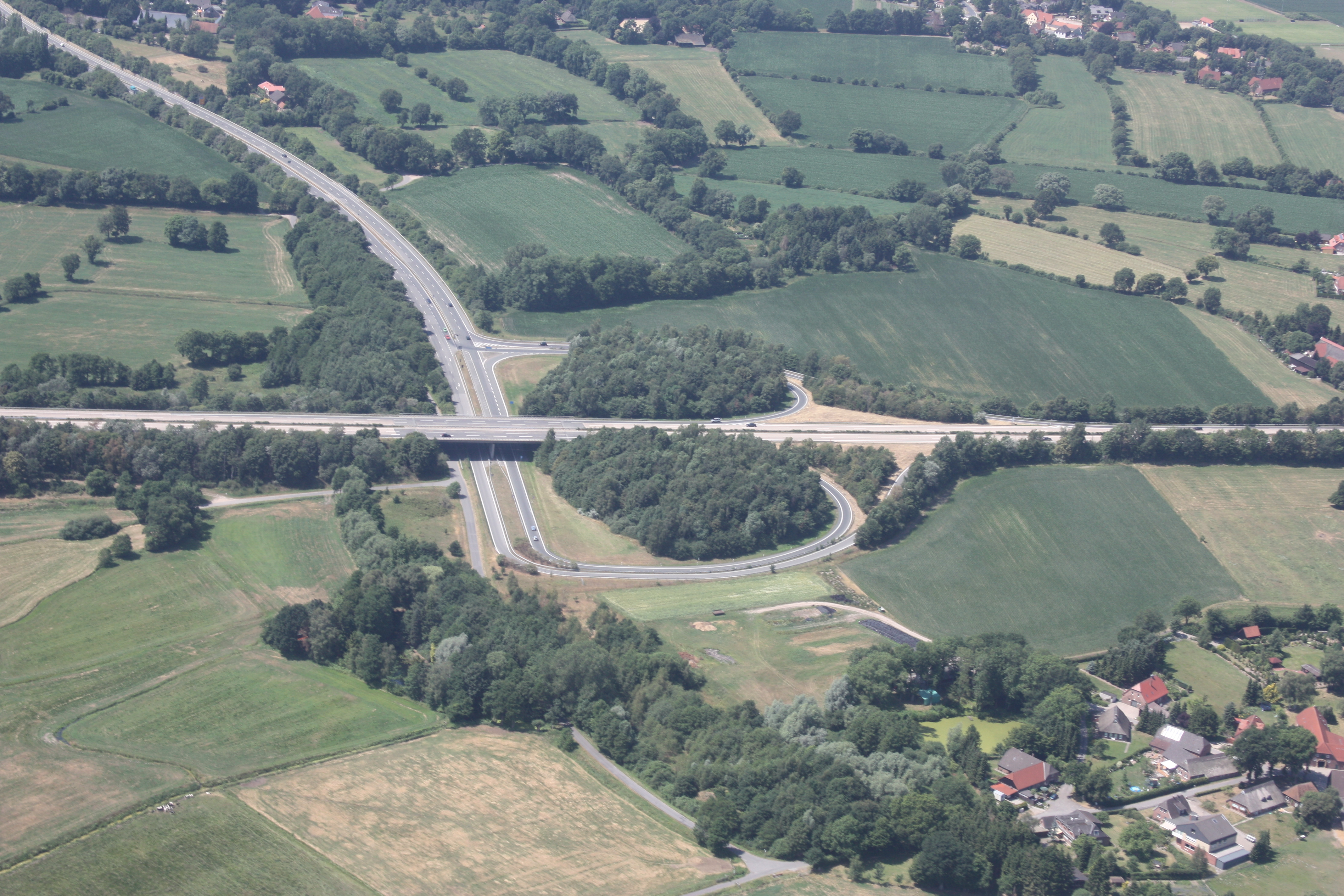 Flug über Oldenburg; von Wilhelmshaven kommend nach Hatten; Flughöhe 500 m = 1500 ft; Juli 2010 Anschlussstelle Oldenburg-Ohmstede der A 29